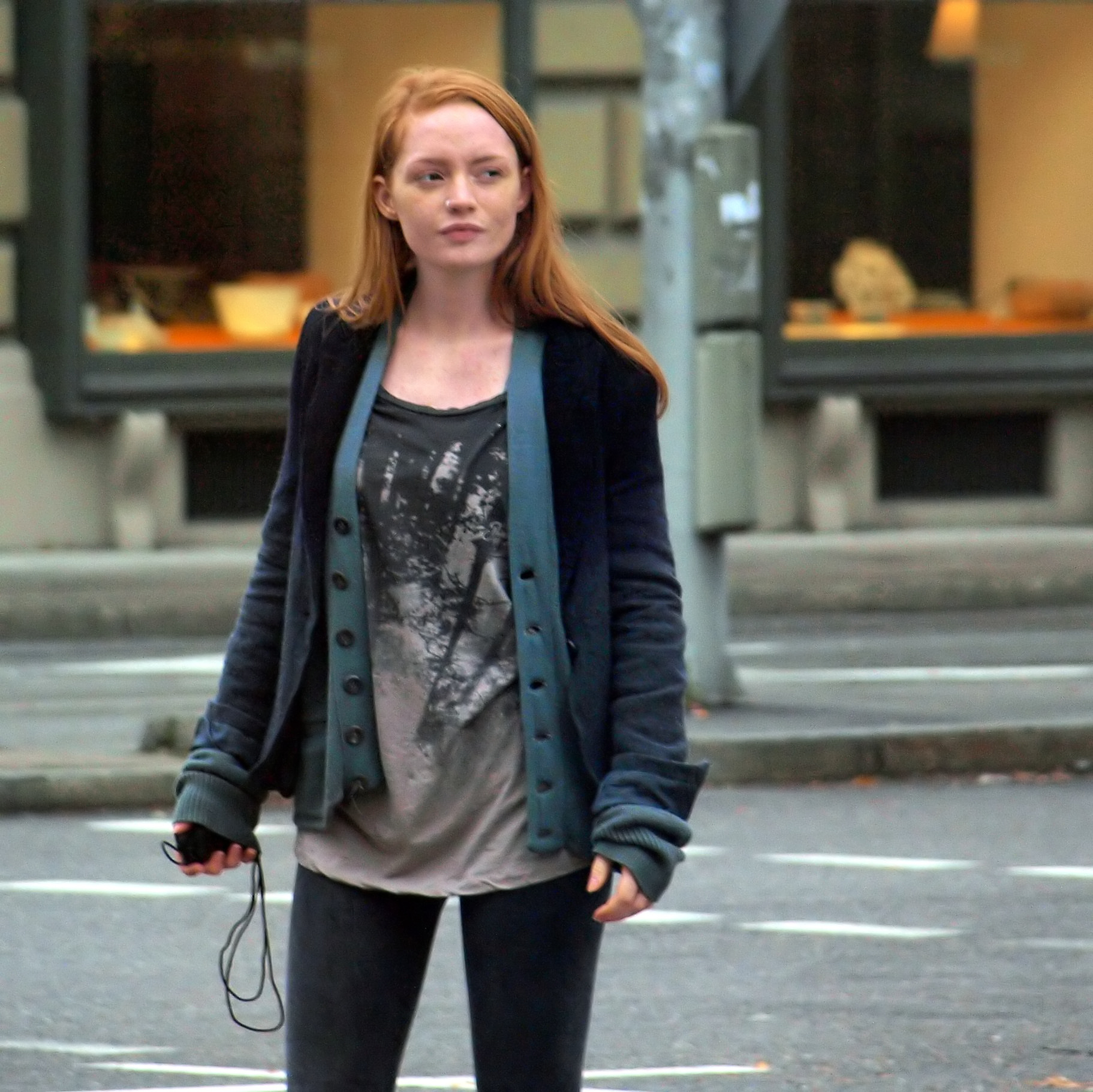 Janina Stopper while filming "Papa allein zu Haus" (working title: "Nur die Guten sterben jung") in Munich